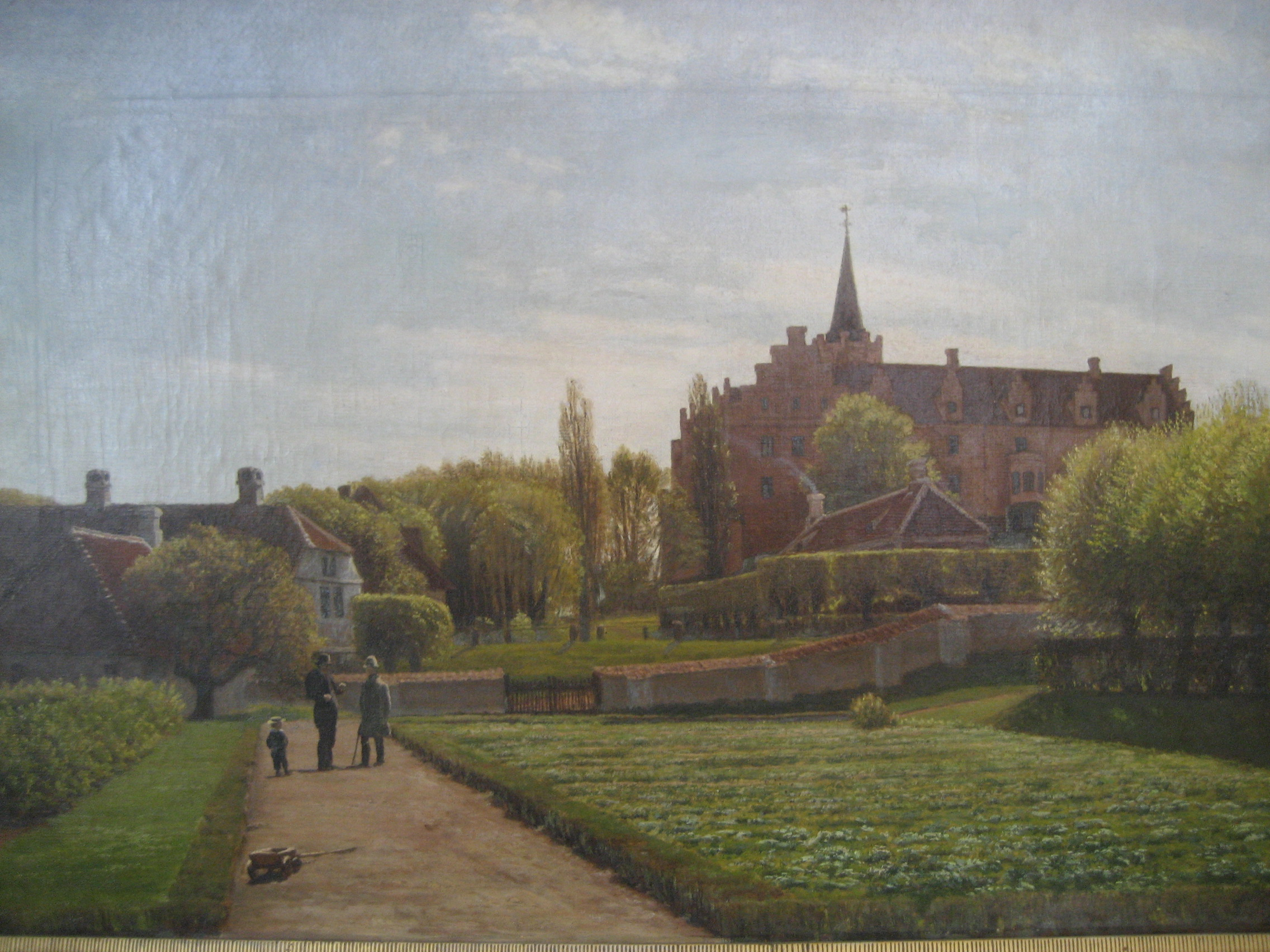 Painting